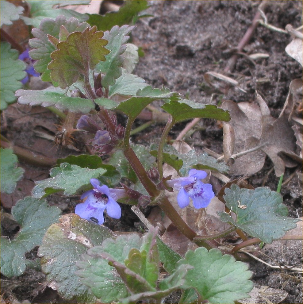 (Hondsdraf plant met bloemen) Glechoma hederacea